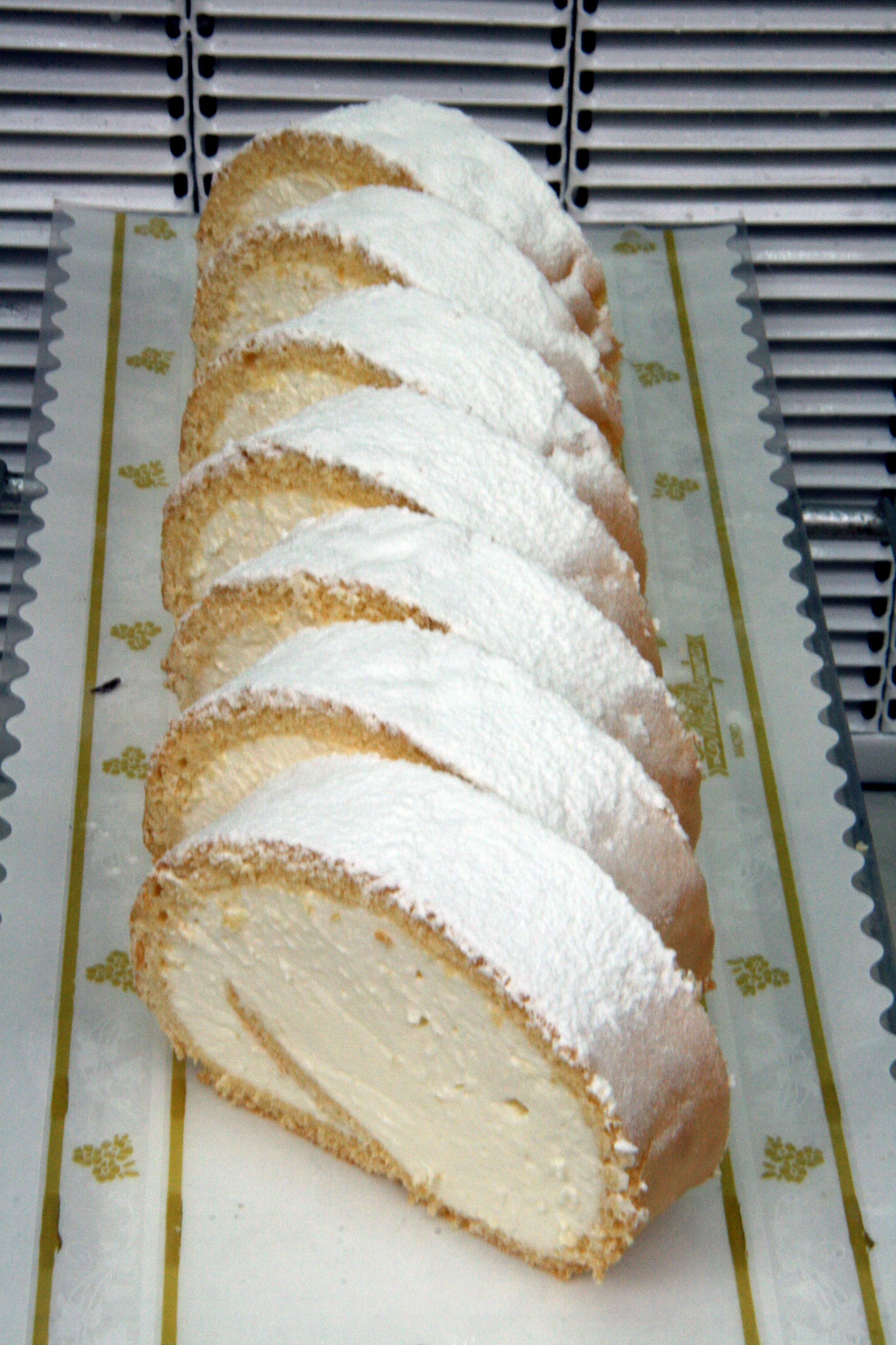 Tronquitos de Nata de la Mallorquina (Madrid)